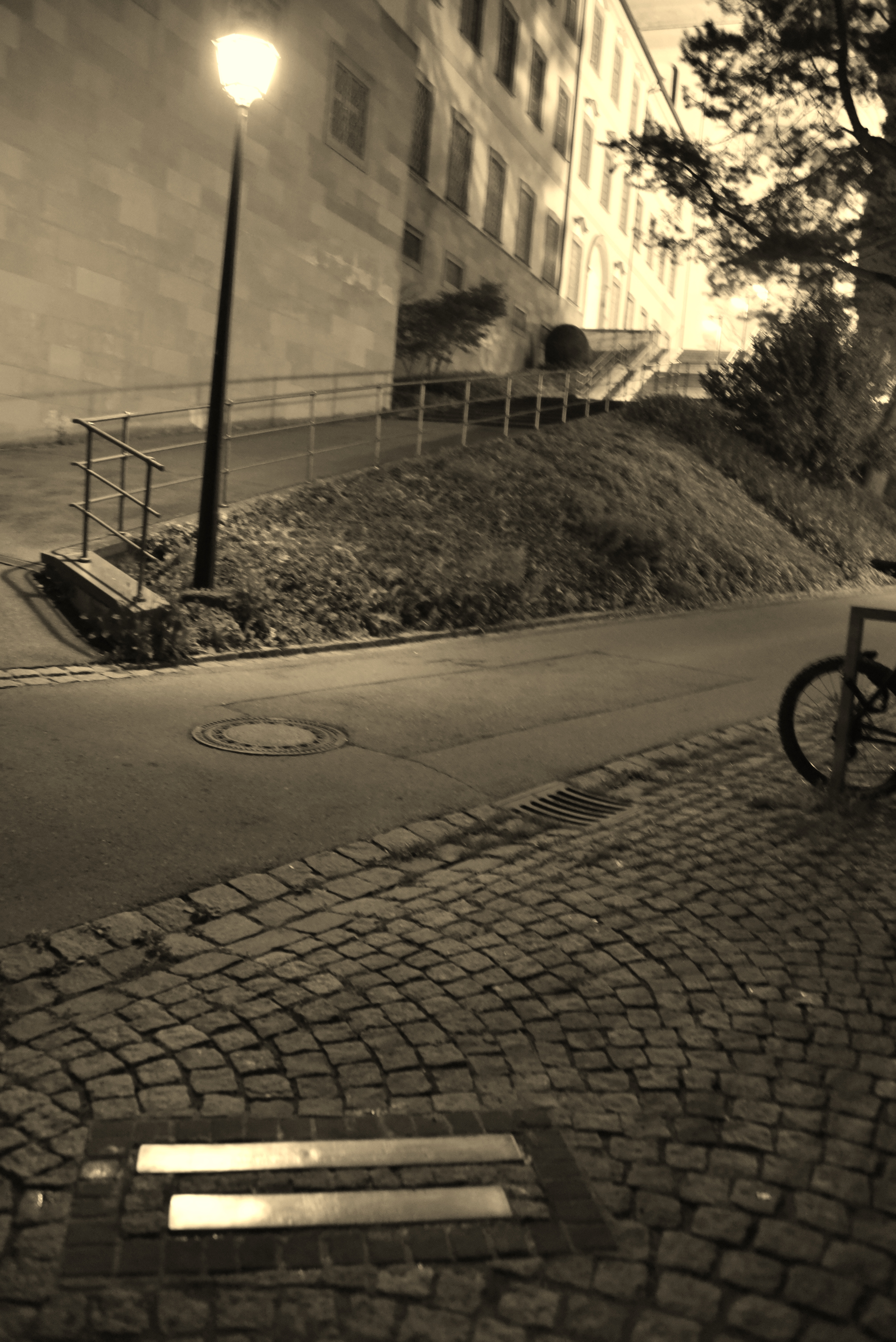 Stolperschwellen in Weingarten, Abteistraße 5